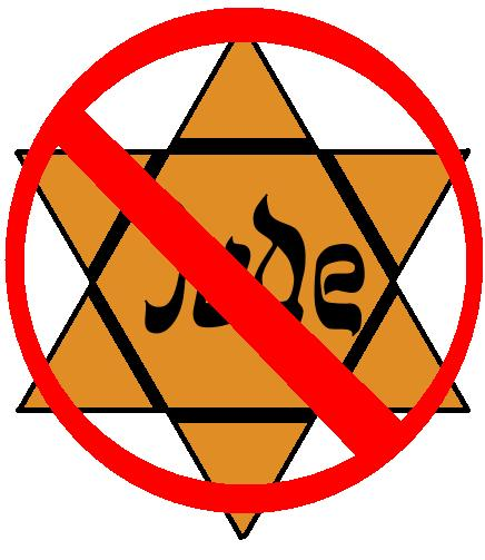 No Confies De los judios